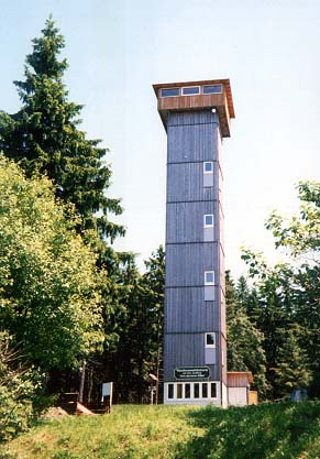 Beschreibung: Aussichtsturm "Otto Hermann Böhm" auf dem Aschberg Quelle: selbst fotografiert im August 2001 Fotograf: Hejkal